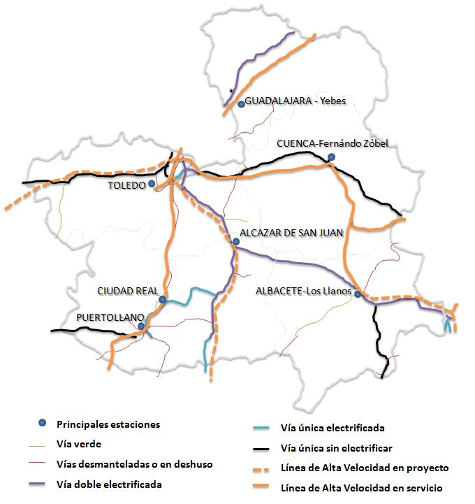 Mapa con las líneas de ferrocarril que atraviesan la Comunidad de Castilla-La Mancha.